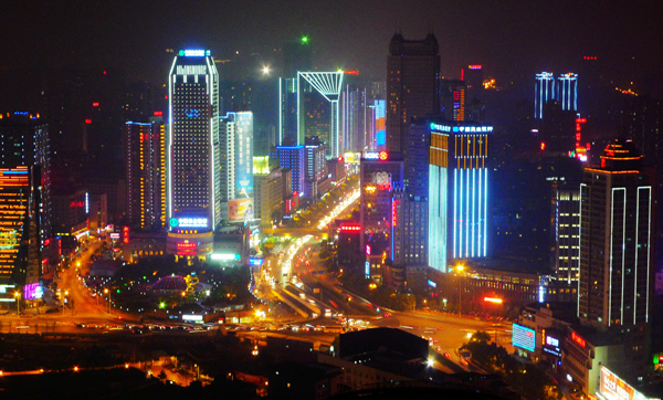 长沙芙蓉广场